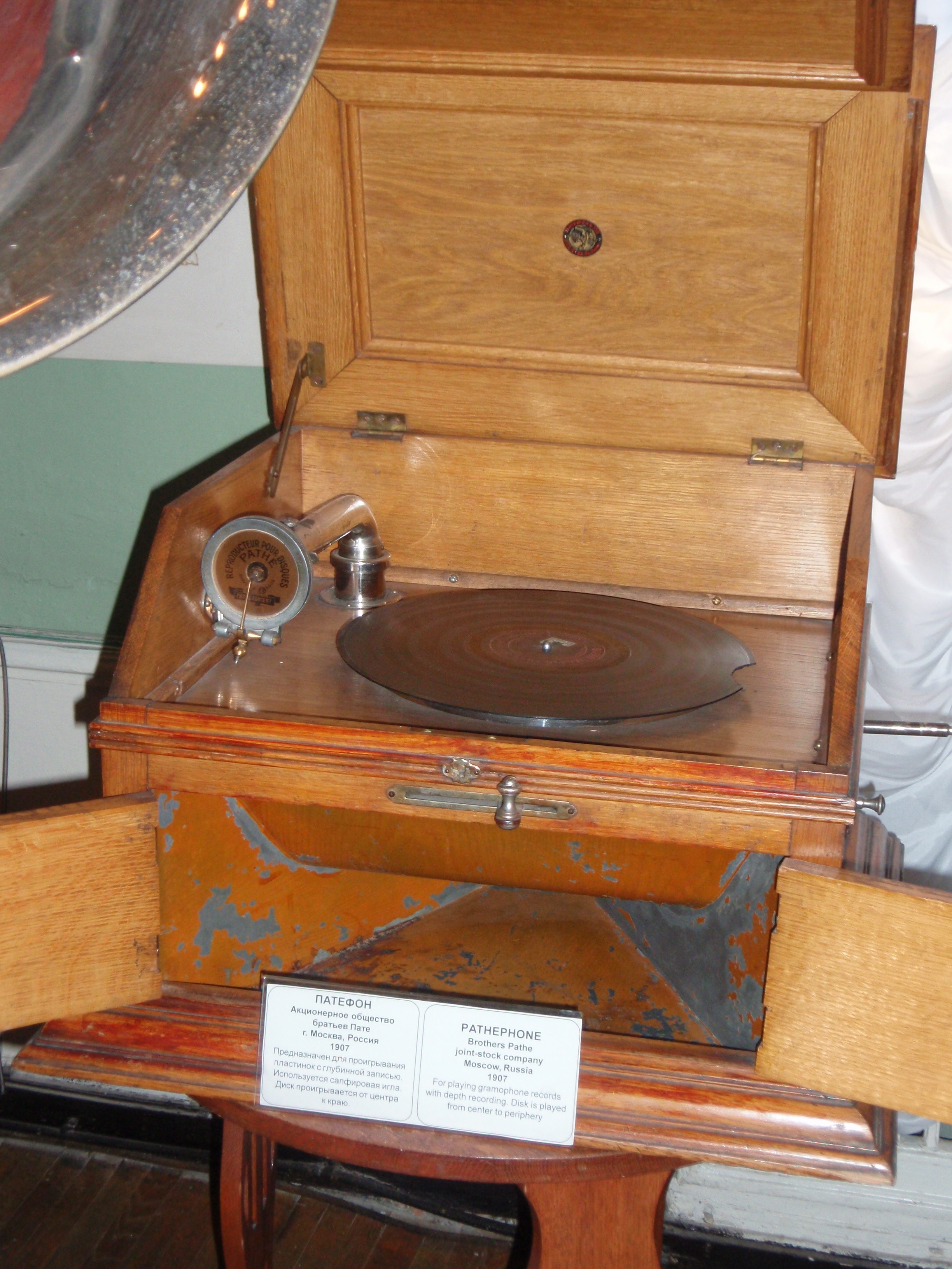 Патефон начала XX-го века, Государственный Политехнический музей (г.Москва)